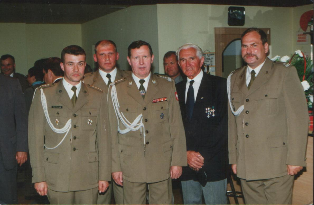 Dowodca 1bcz mjr Waldemar Janiak